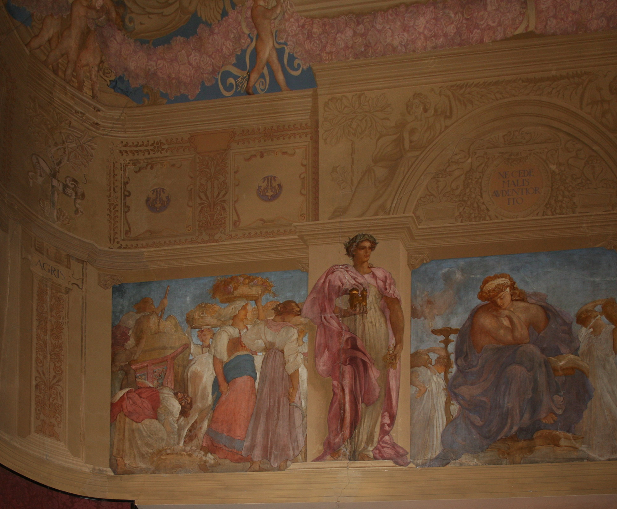 Un sentito ringraziamento a S.E. il Prefetto di Ascoli Piceno Dott. Alberto Cifelli che, accordandomi il permesso di ingresso al salone, ha consentito lo scatto di questa immagine.